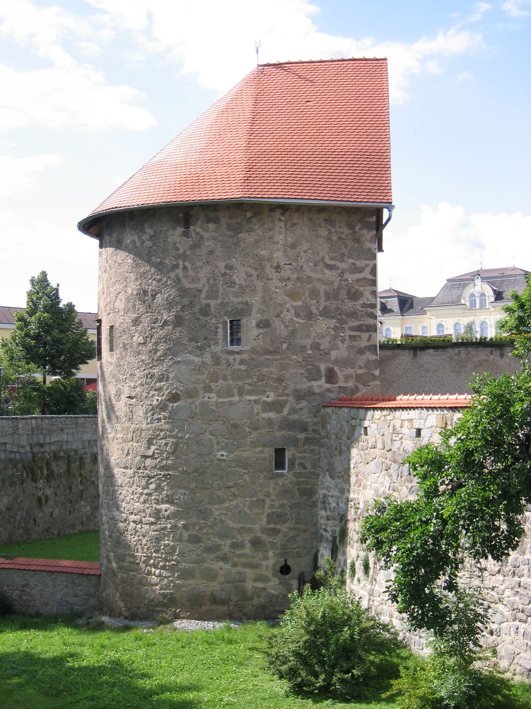 Bürgerkorpsturm in Freistadt